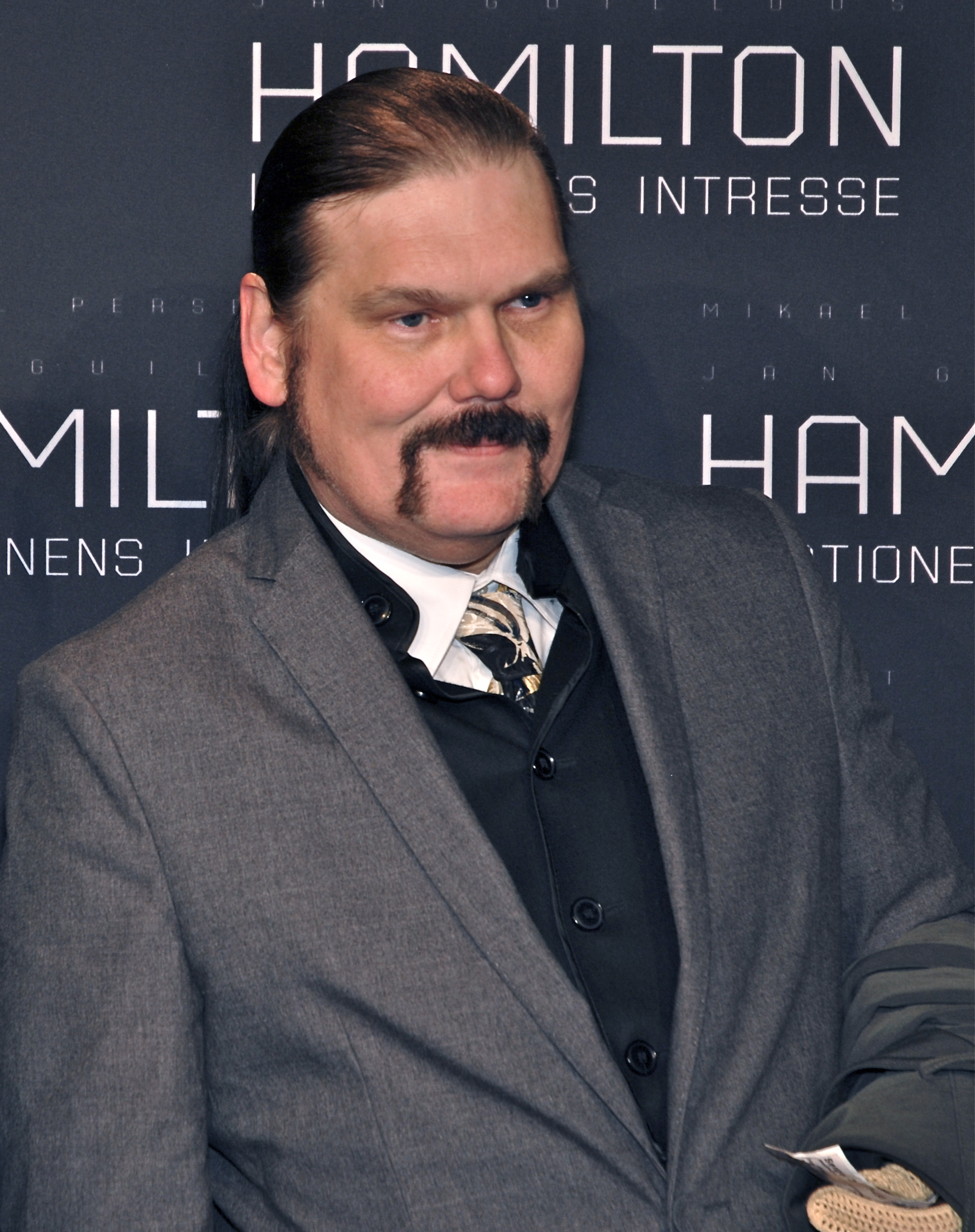 Anders Tengner på galapremiären av Hamilton - I nationens intresse, på biograf Sergel i Stockholm den 9 januari 2012.